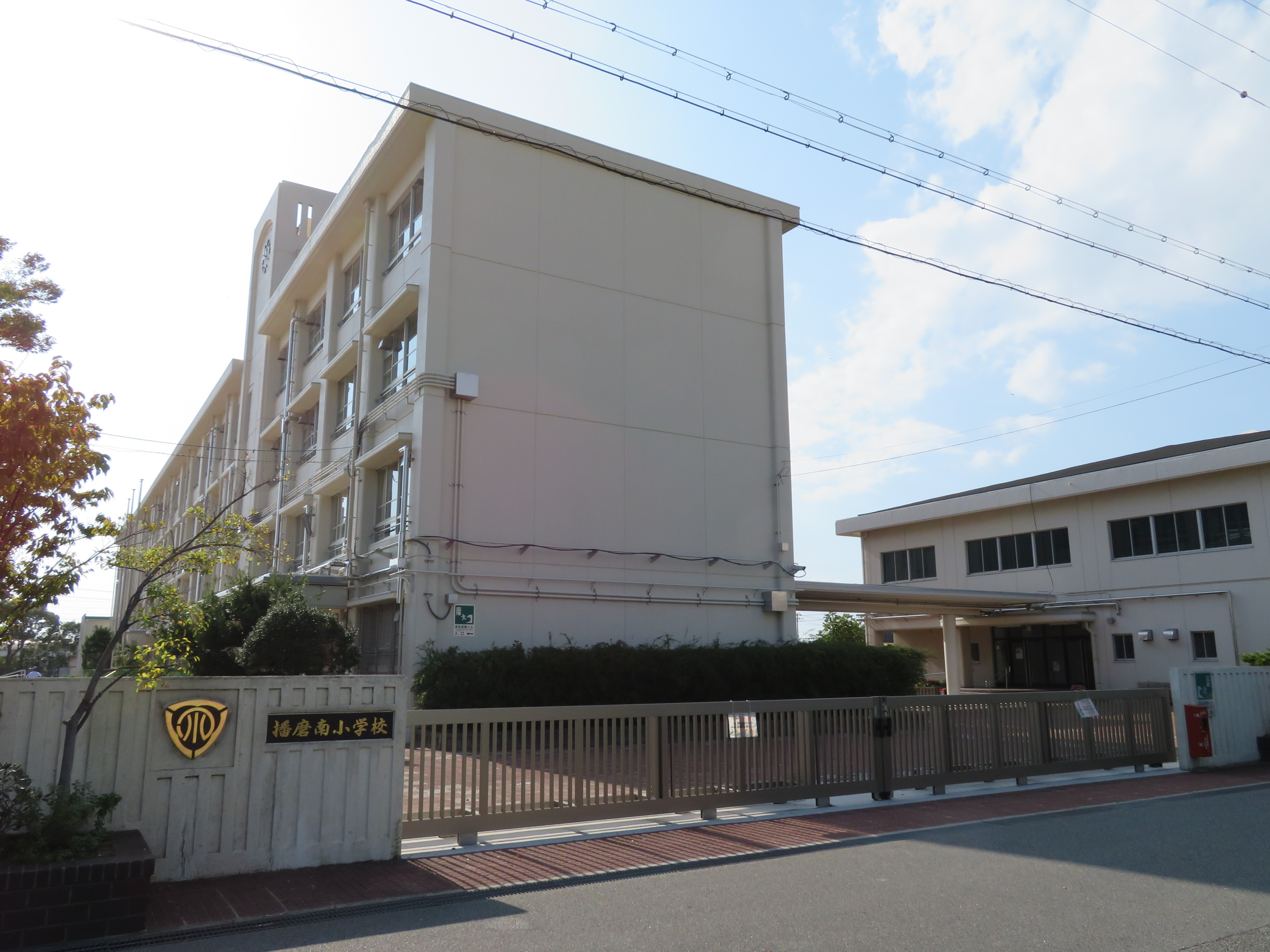 播磨町立播磨南小学校